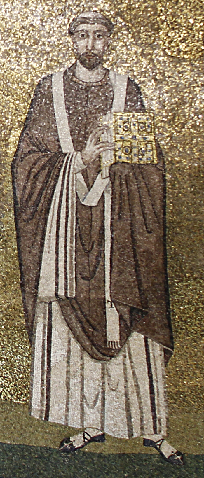 Sant'Agnese fuori le mura - Rome